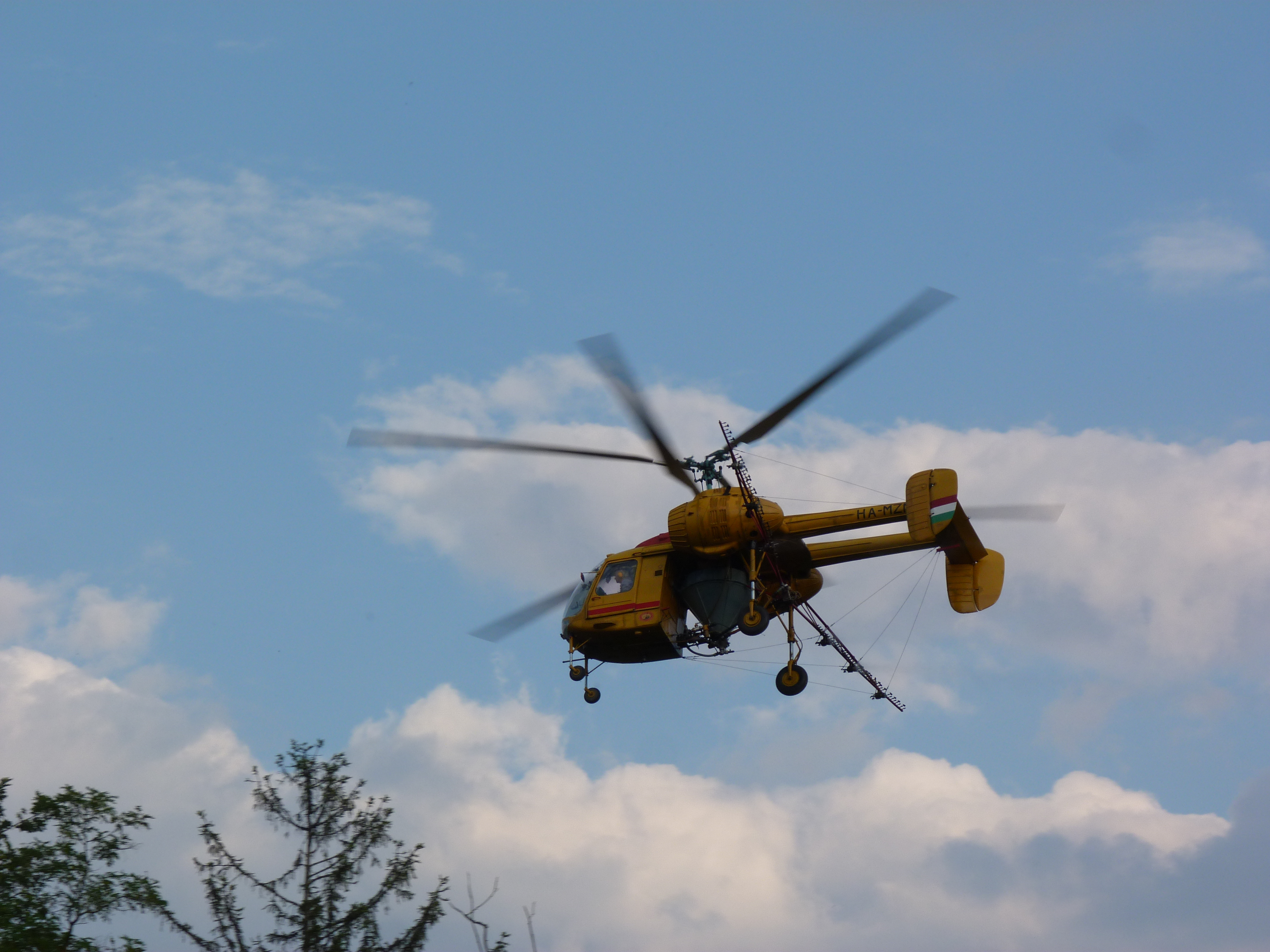 A felvétel Széphalmon készült, 2014. június 19-én. Kamov helikopter, szúnyog elleni permetezés.